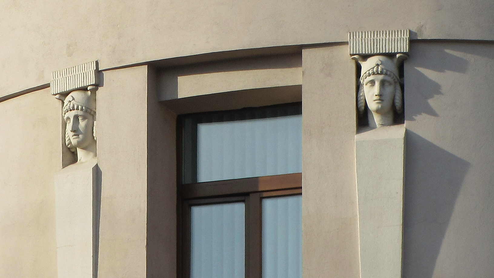 Дом Менскага земляробчага таварыства, маскарон